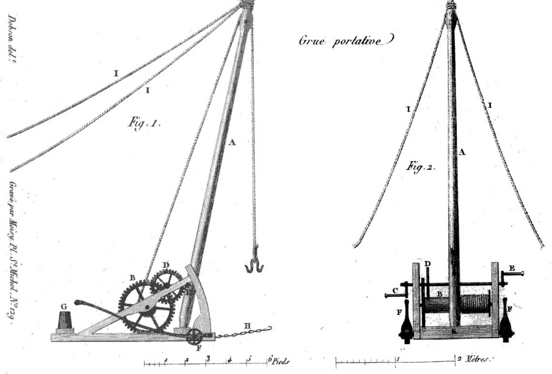 Grue portative en 1811